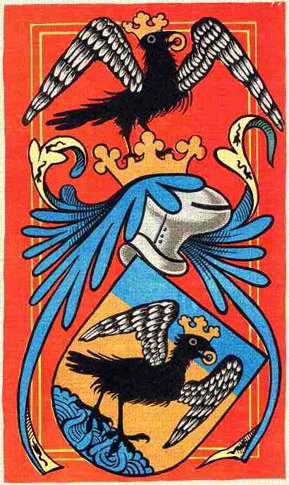 Barrwy-i Simon címere, 1417